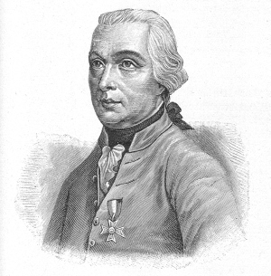 Michael Friedrich Benedikt von Melas (1729-1806), feld-maréchal de l'armée d'Autriche et commandeur de l'ordre militaire de Marie-Thérèse.